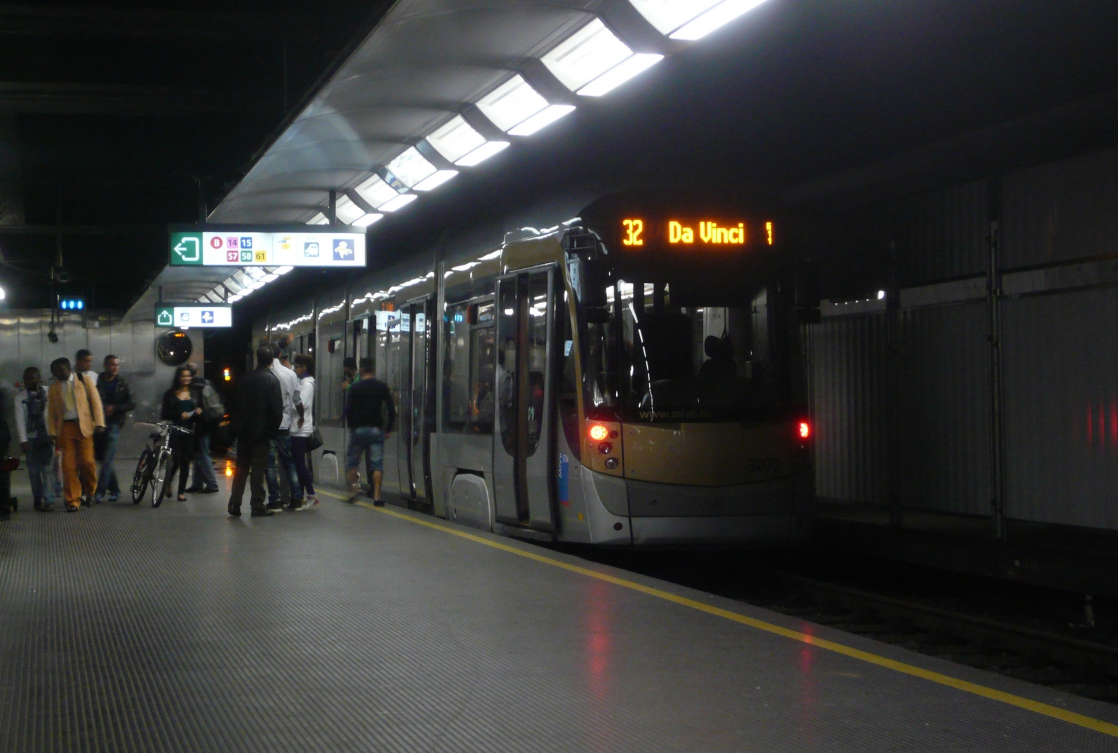 Tramway de Bruxelles - La motrice 3072 sur la ligne 32 à la Gare du Nord vers Da Vinci.